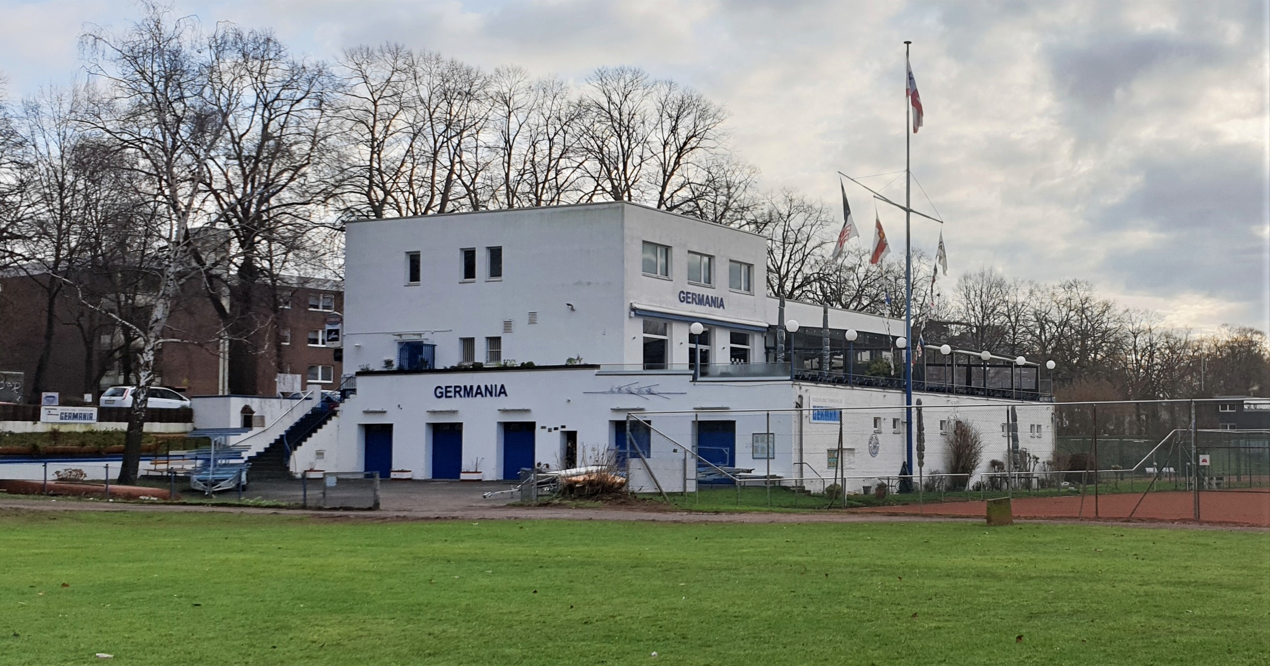 Bootshaus der RTK Germania Köln im Stadtteil Poll, am Rheinufer gelegen.